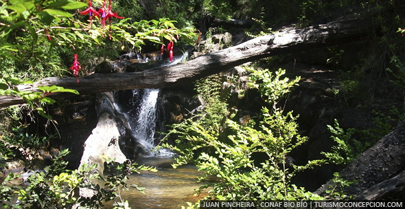 Estero nonguén